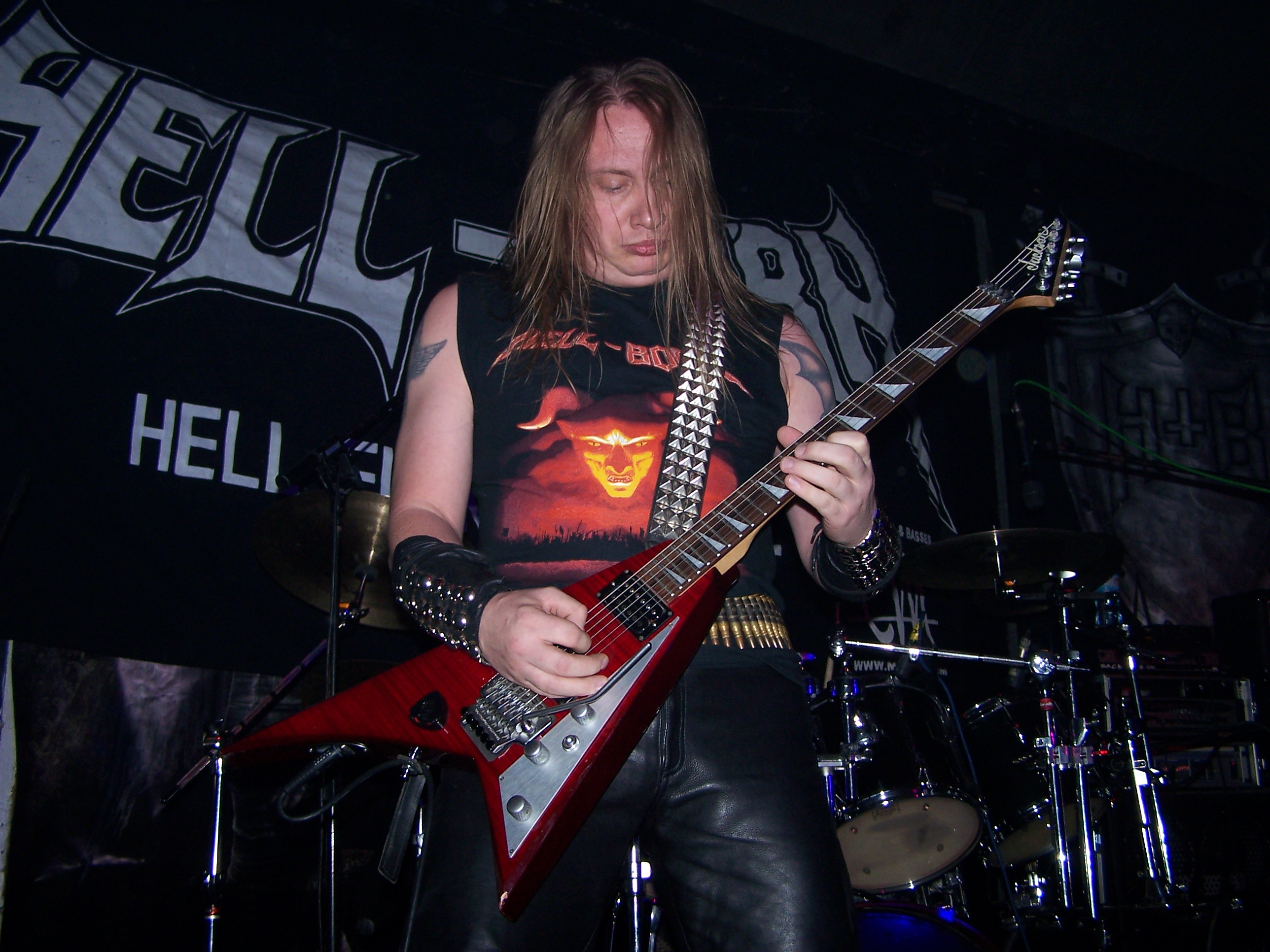 Les - wokalista wspomagający i gitarzysta zespołu Hell-Born podczas koncertu w katowickim Mega Clubie.